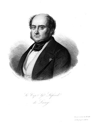 Portrait de 1844 par Demoussy, gravé en 1845 par Gustave Levy.